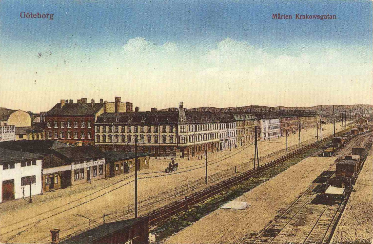 Mårten Krakowsgatan, Hulmans holme. Röda tegelhuset till vänster på bilden är nuvarande Kilsgatan 10.